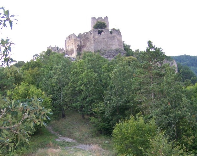 Čabraď Castle in Slovakia, Krupina District, Front View